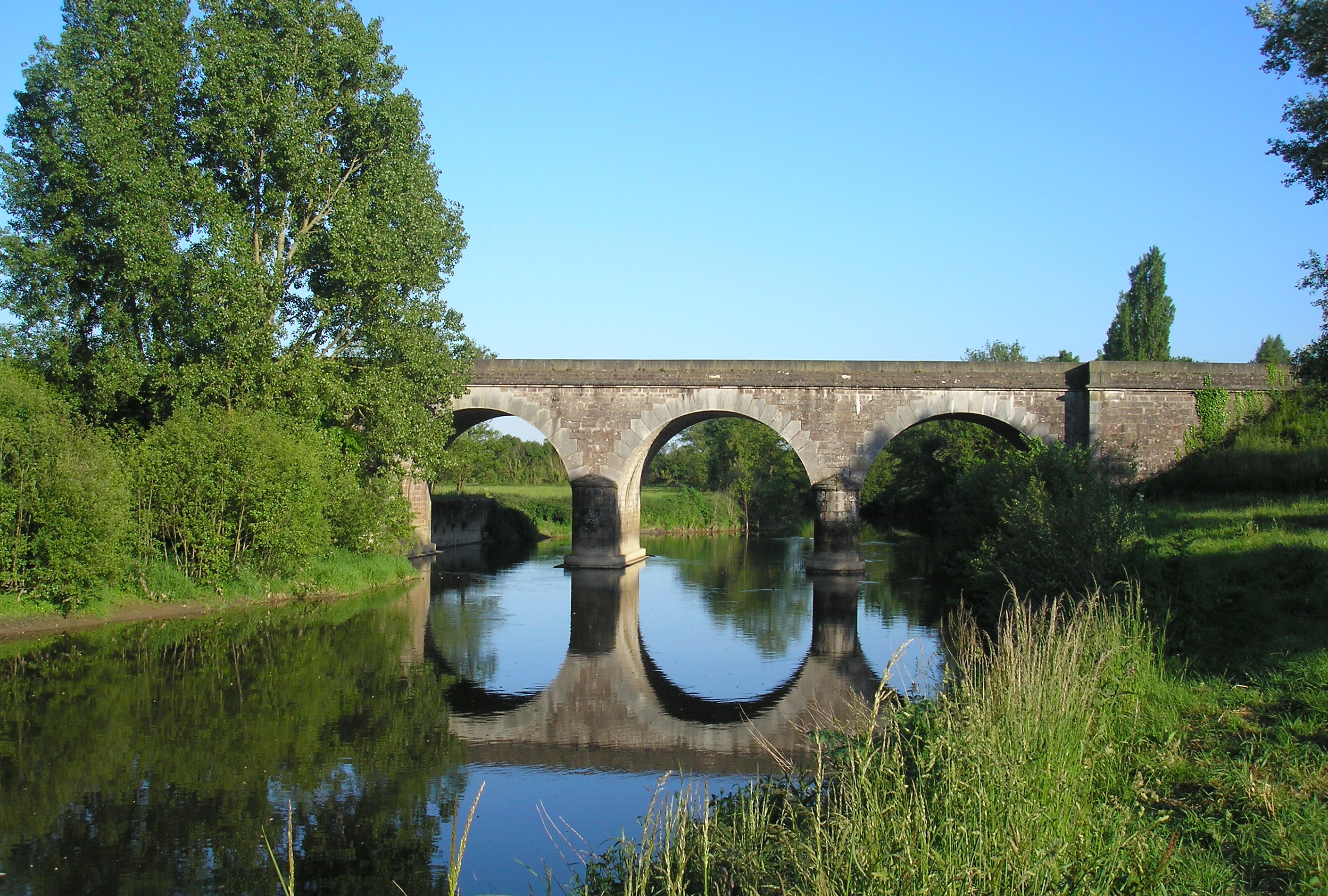 Le pont de Gourfaleur, sur la Vire, en limite des communes de Saint-Lô, Baudre et Gourfaleur (Normandie, France).